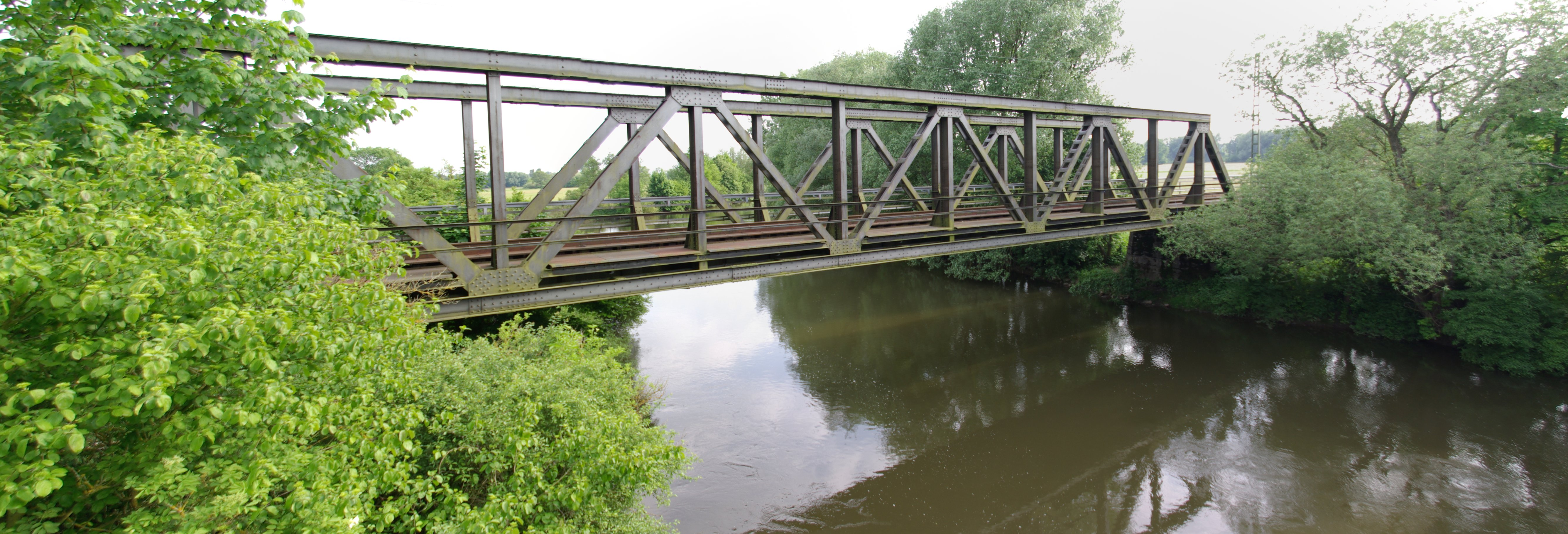 Brücke der Bahnstrecke Erlangen-Bruck–Herzogenaurach über die Regnitz zwischen den Erlanger Stadtteilen Bruck und Eltersdorf.